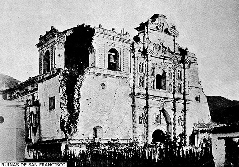 Ruinas de San Francisco en 1897. La grieta del campanario se agravó tras el terremoto del 3 de septiembre de 1874.